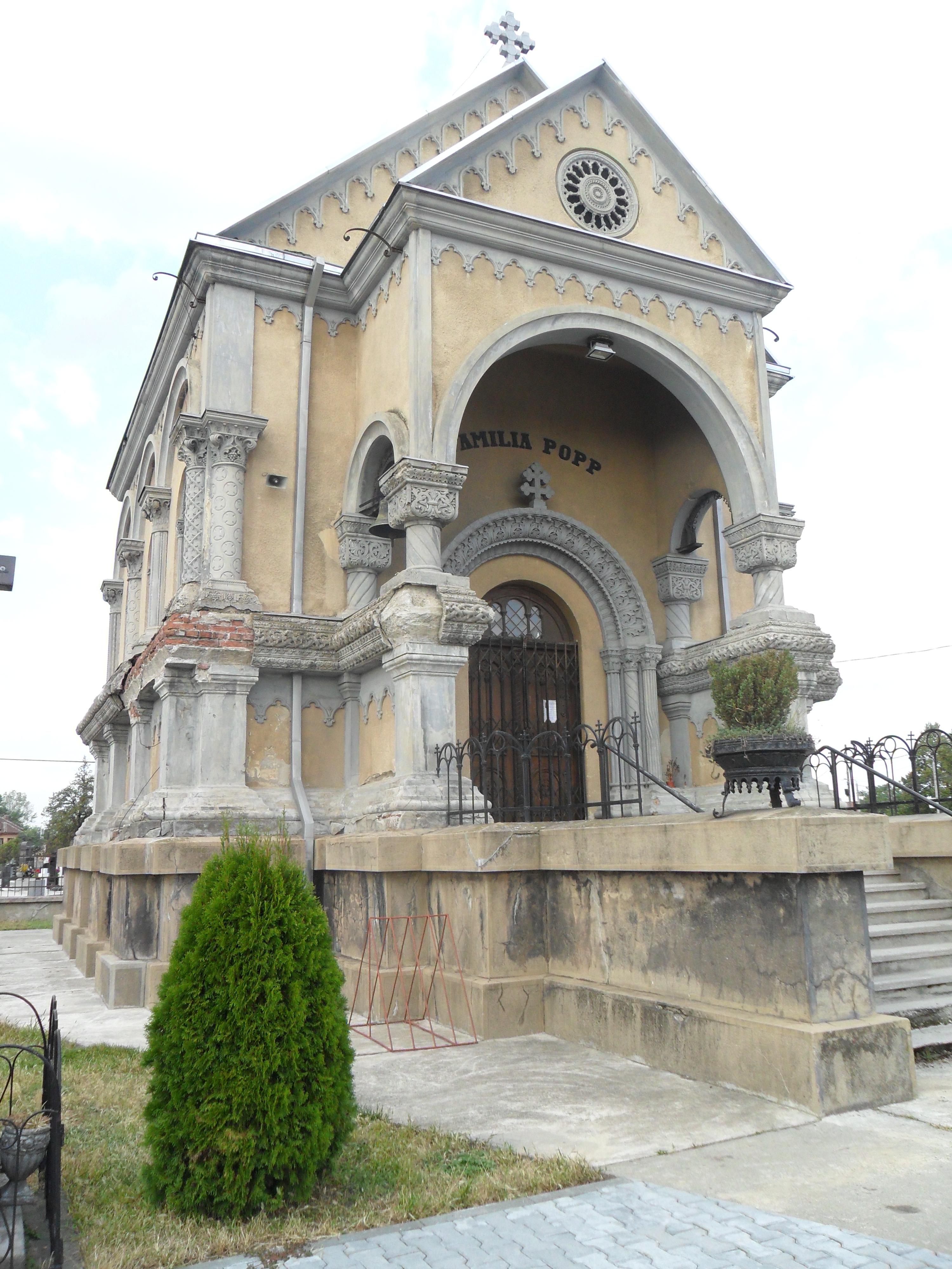 Biserica - capelă "Aurel Popp"